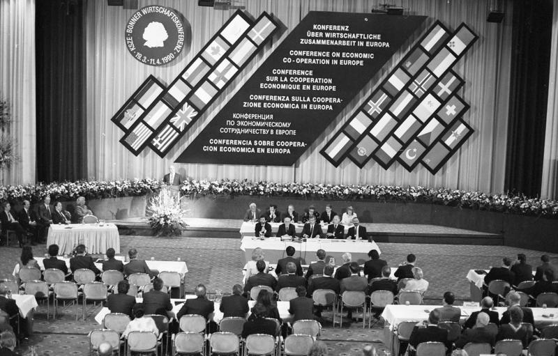 Am 19.3.1990 wurde im Bonner Hotel- und Kongreßzentrum "Maritim" die erste Wirtschaftskonferenz der 35 Unterzeichnerstaaten der Schlußakte von Helsinki über Sicherheit und Zusammenarbeit in Europa (KSZE) eröffnet, die bis zum 11.4.1990 dauern wird.